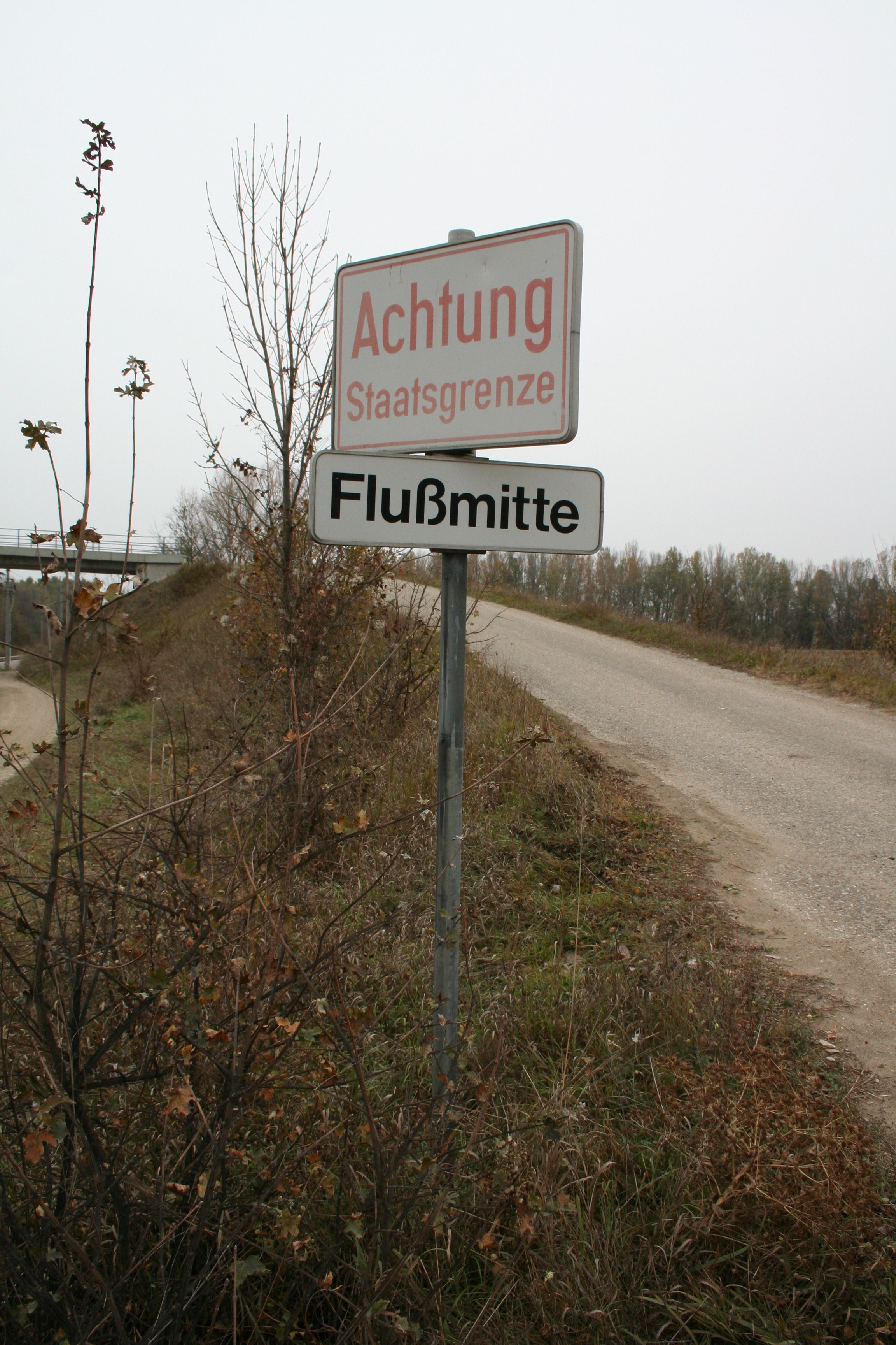 Achtung Staatsgrenze